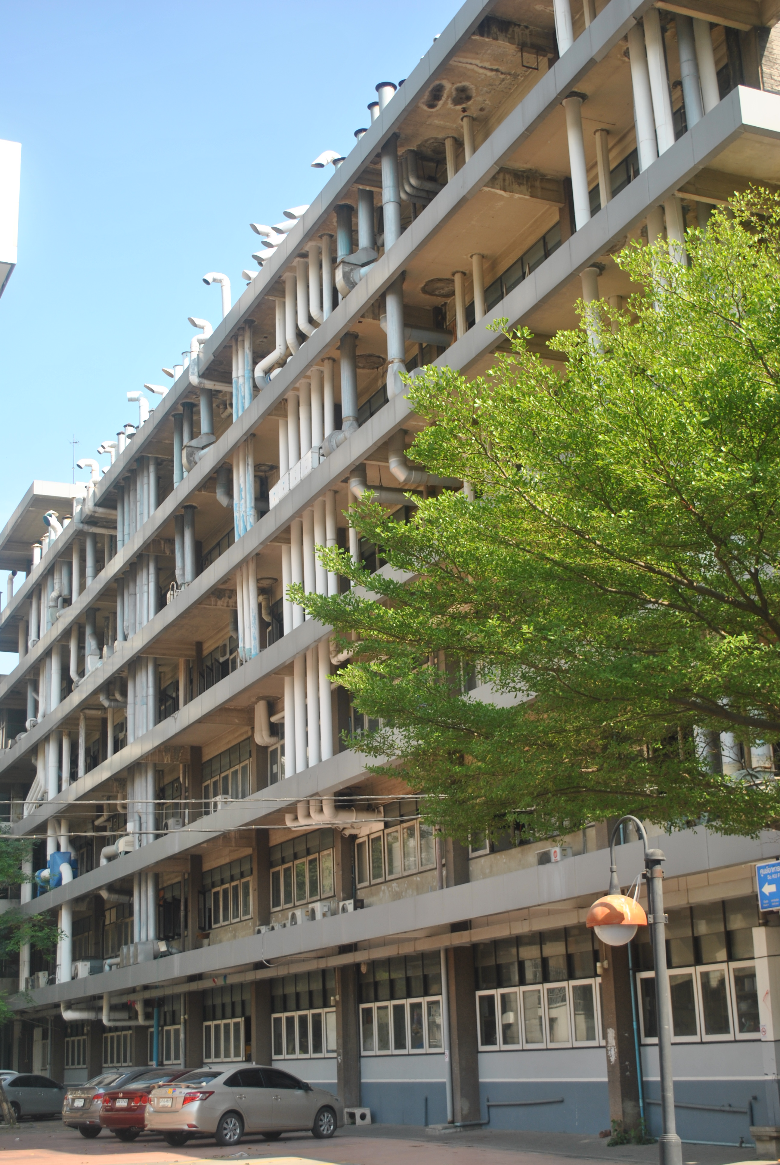 อาคารกฤษณา ชุติมา (ตึกเคมี) คณะวิทยาศาสตร์ มหาวิทยาลัยเกษตรศาสตร์ กรุงเทพมหานคร ประเทศไทย